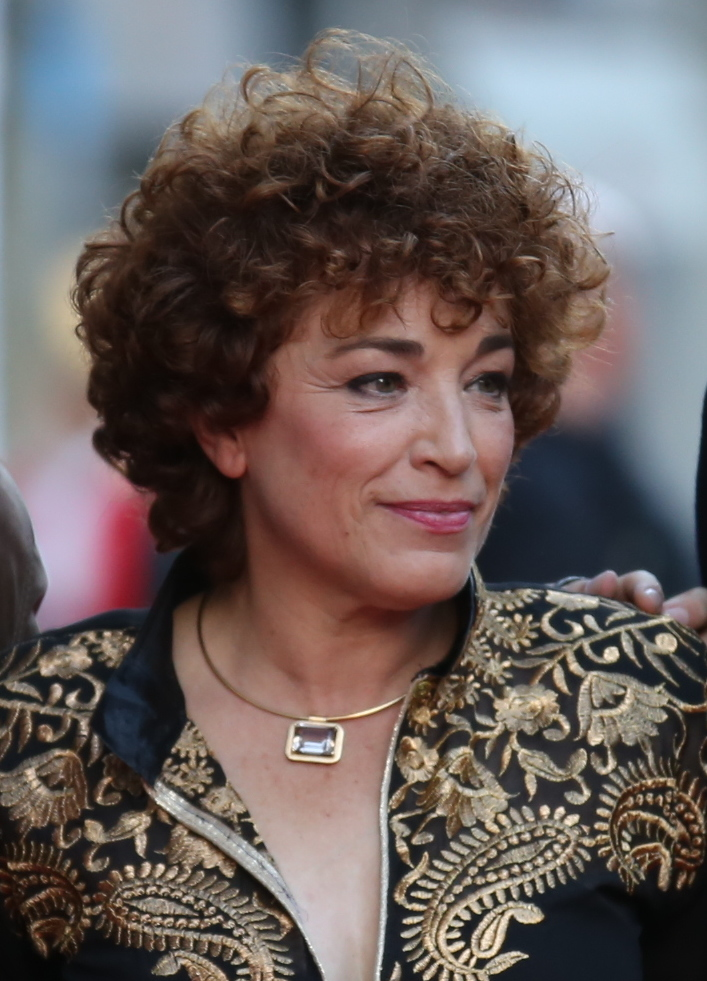 Seminci 2016